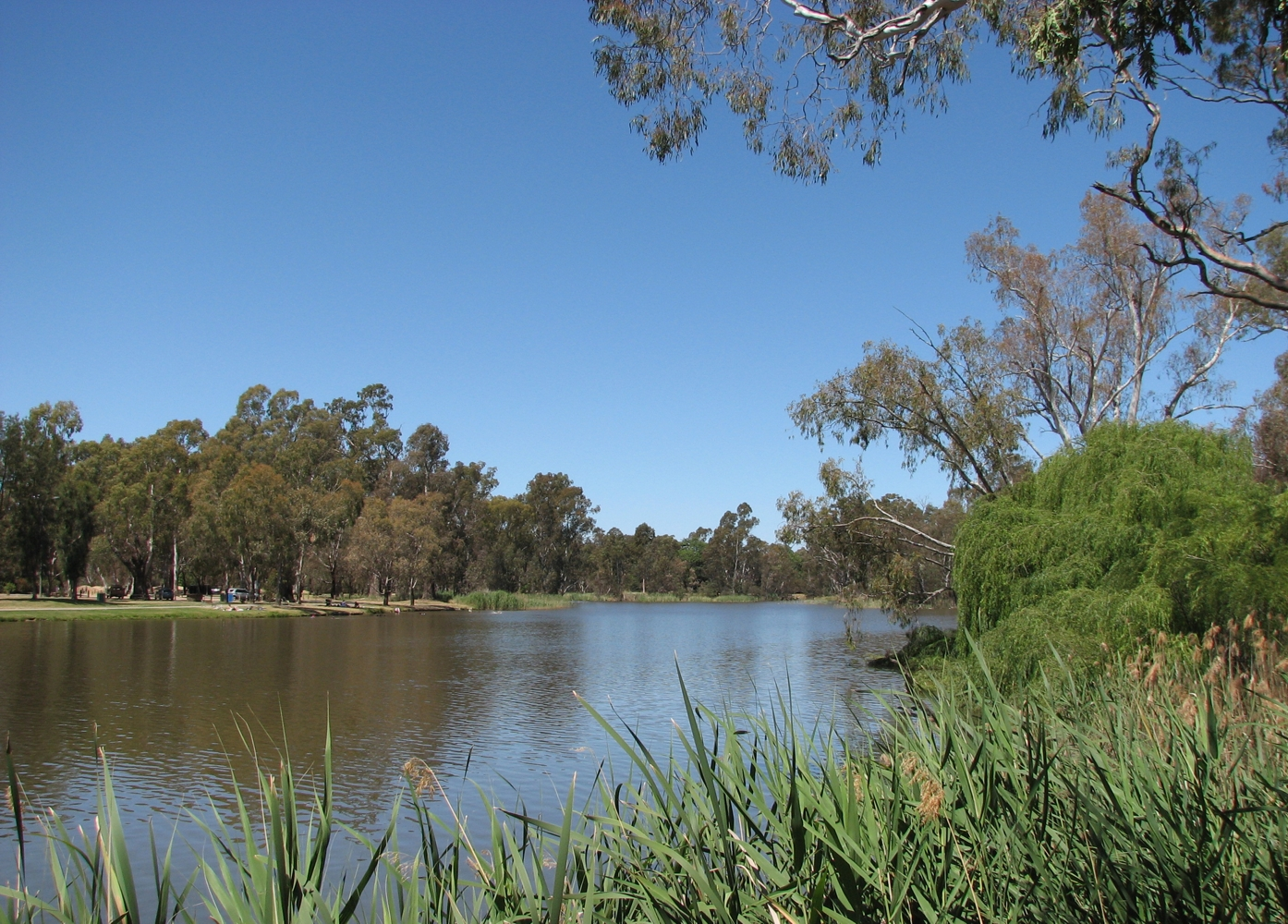 Lake Benalla, Victoria, Australia